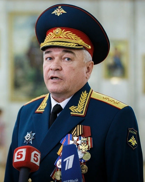 Генерал-полковник С. А. Макаров на церемонии вручения ордена Кутузова Военной академии Генерального штаба Вооруженных Сил России.